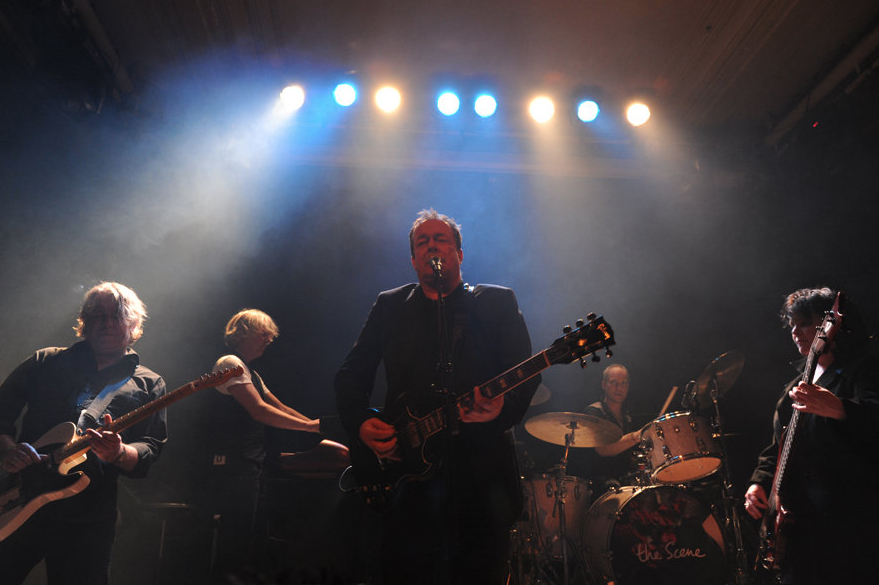 The Scene, popband, Thé Lau